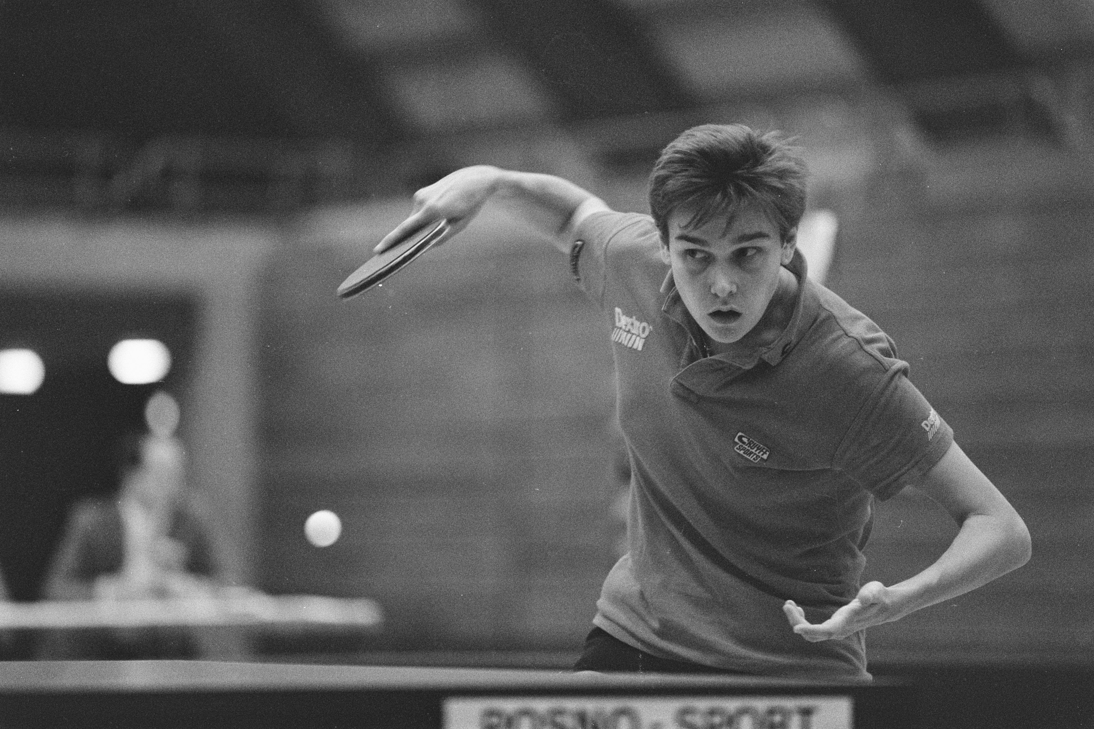 NK tafeltennis in Amsterdam; Bettine Vriesekoop die 3 titels behaalde NL-HaNA 2.24.01.05 0 933-8471